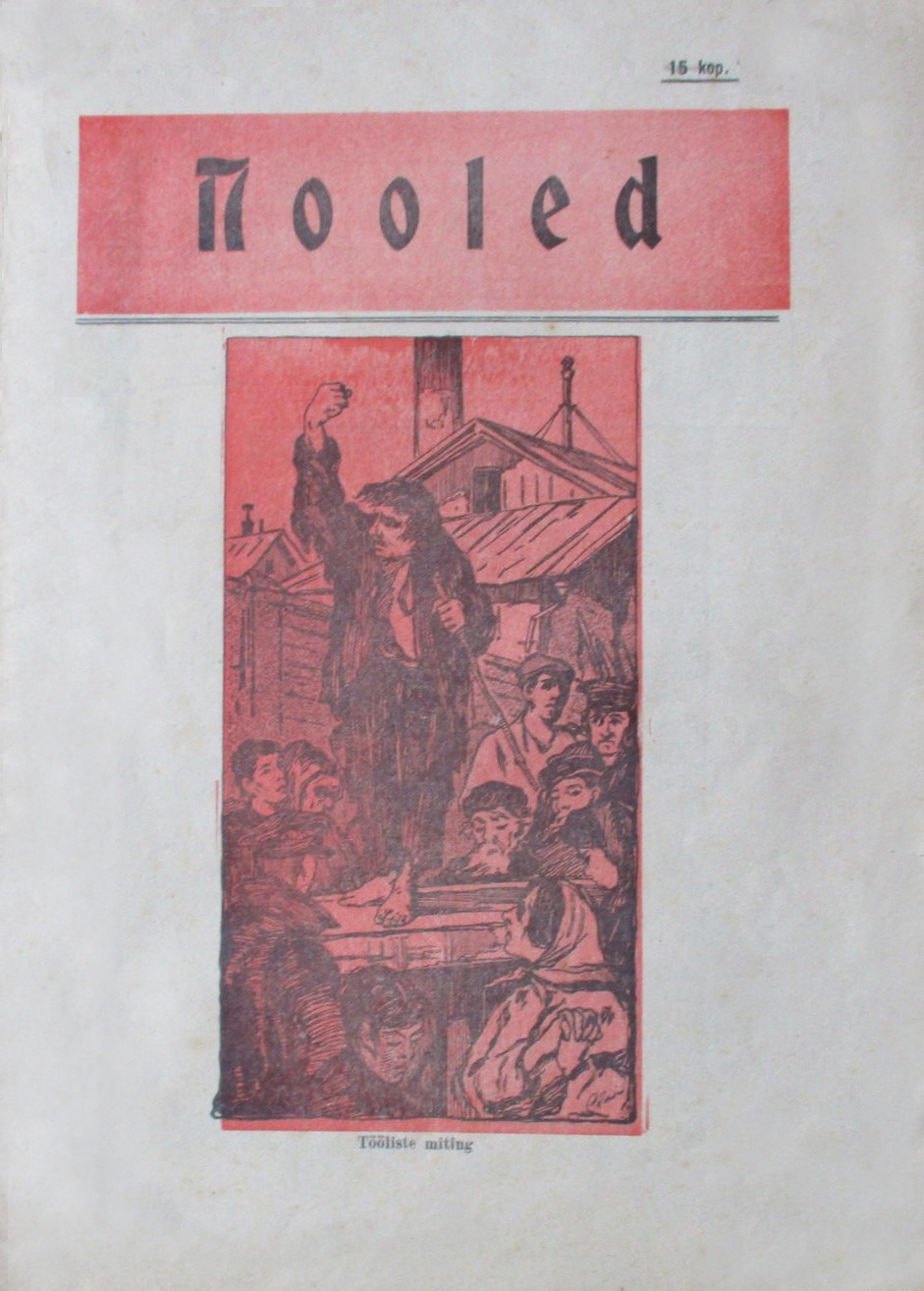 Ajakiri Nooled 1906 esikaas